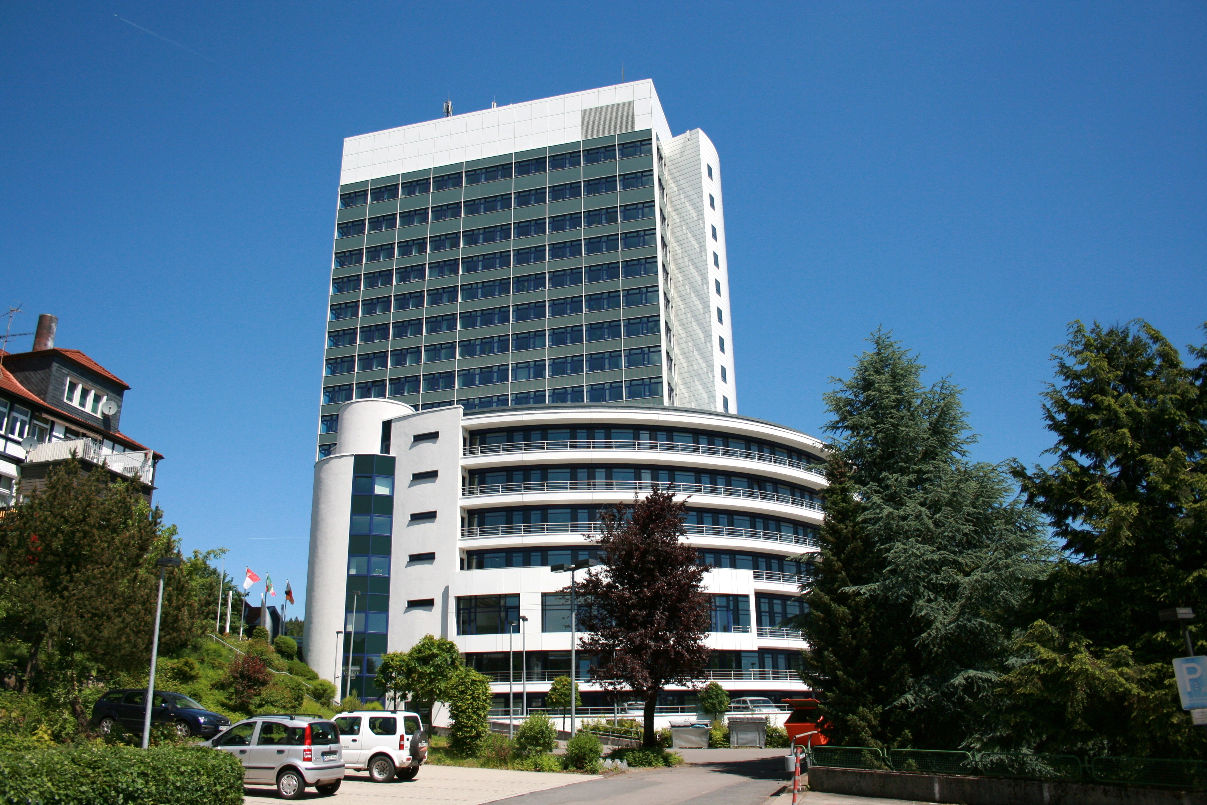 Kreishaus in Gummersbach